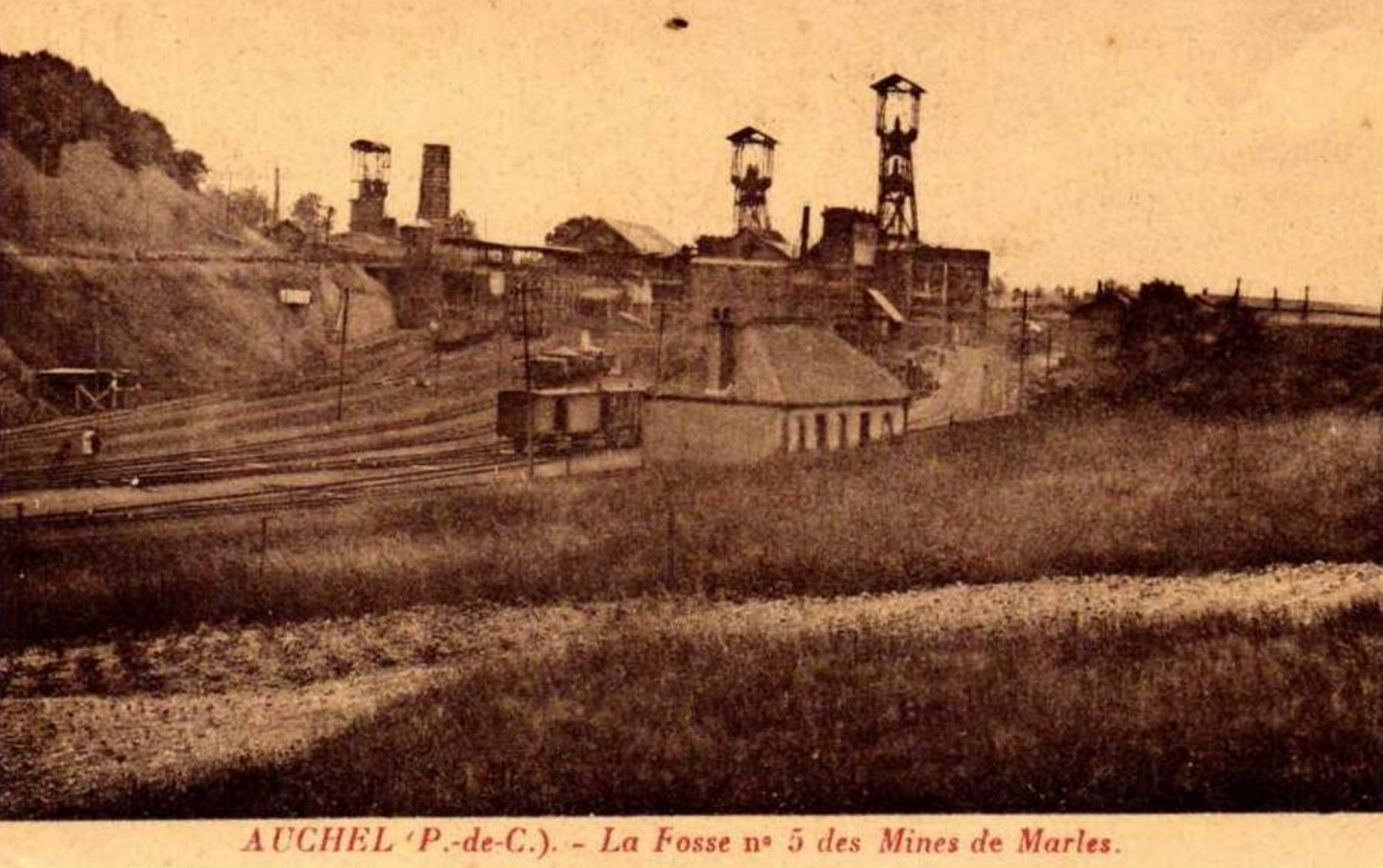 La Fosse n° 5 - 5 bis - 5 ter de la Compagnie des mines de Marles était un charbonnage constitué de trois puits situé à Auchel, Pas-de-Calais, Nord-Pas-de-Calais, France.